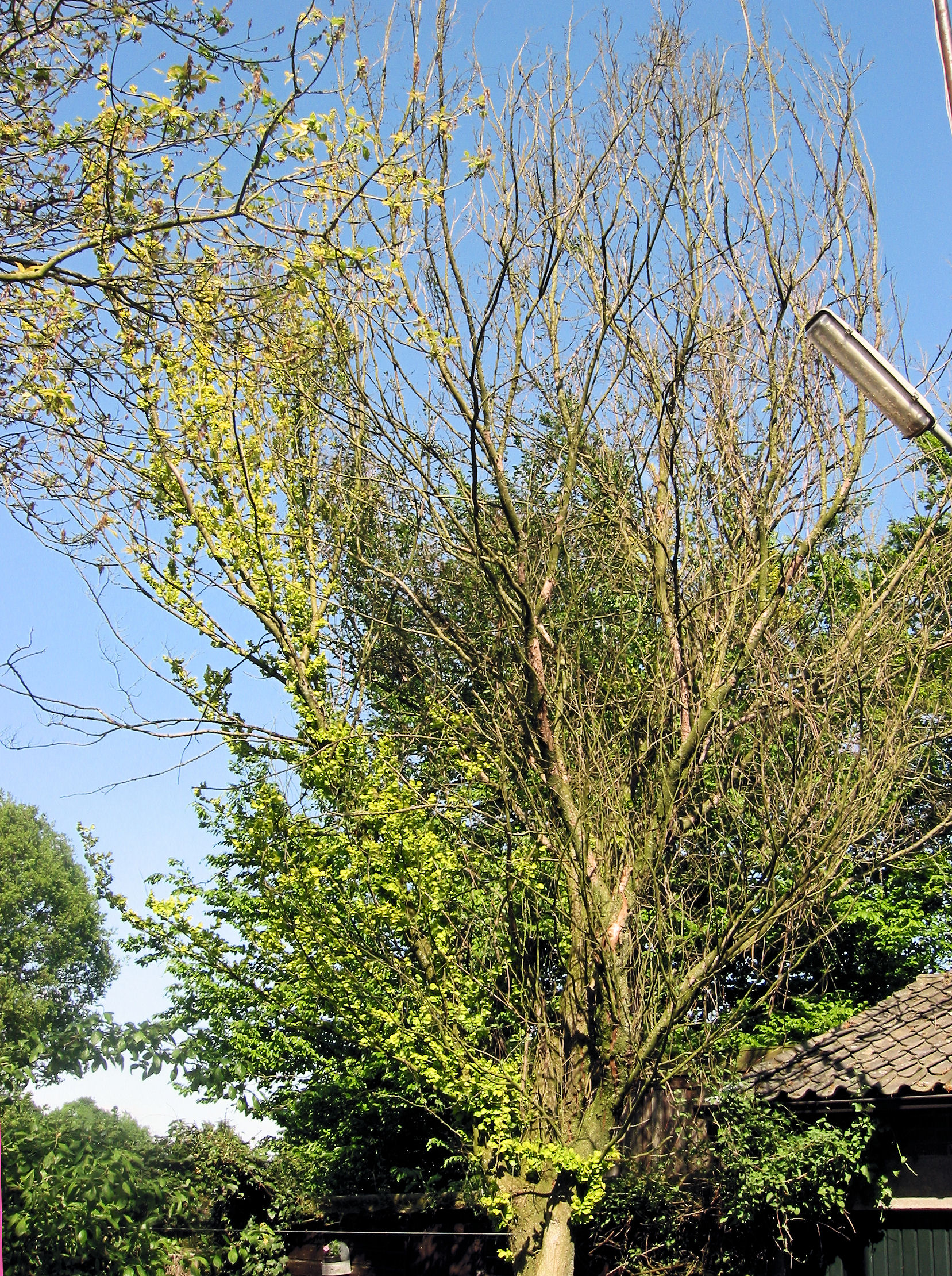 (Iepziekte op goudiep) (Ophiostoma ulmi on Ulmus hollandica 'Wredei'